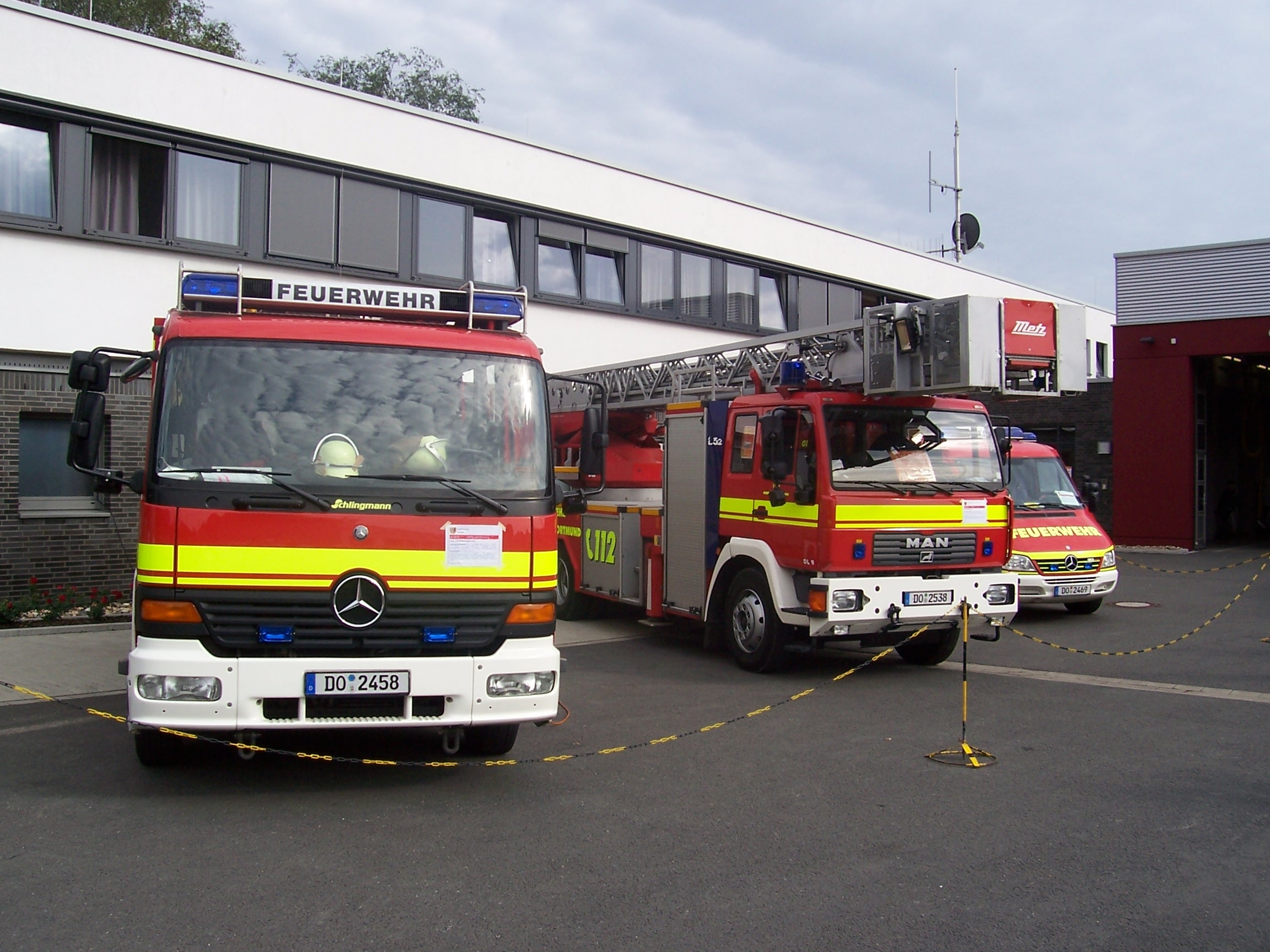 Grundschutz der Berufsfeuerwehr Dortmund - Fire engines of the fire department Dortmund, Germany